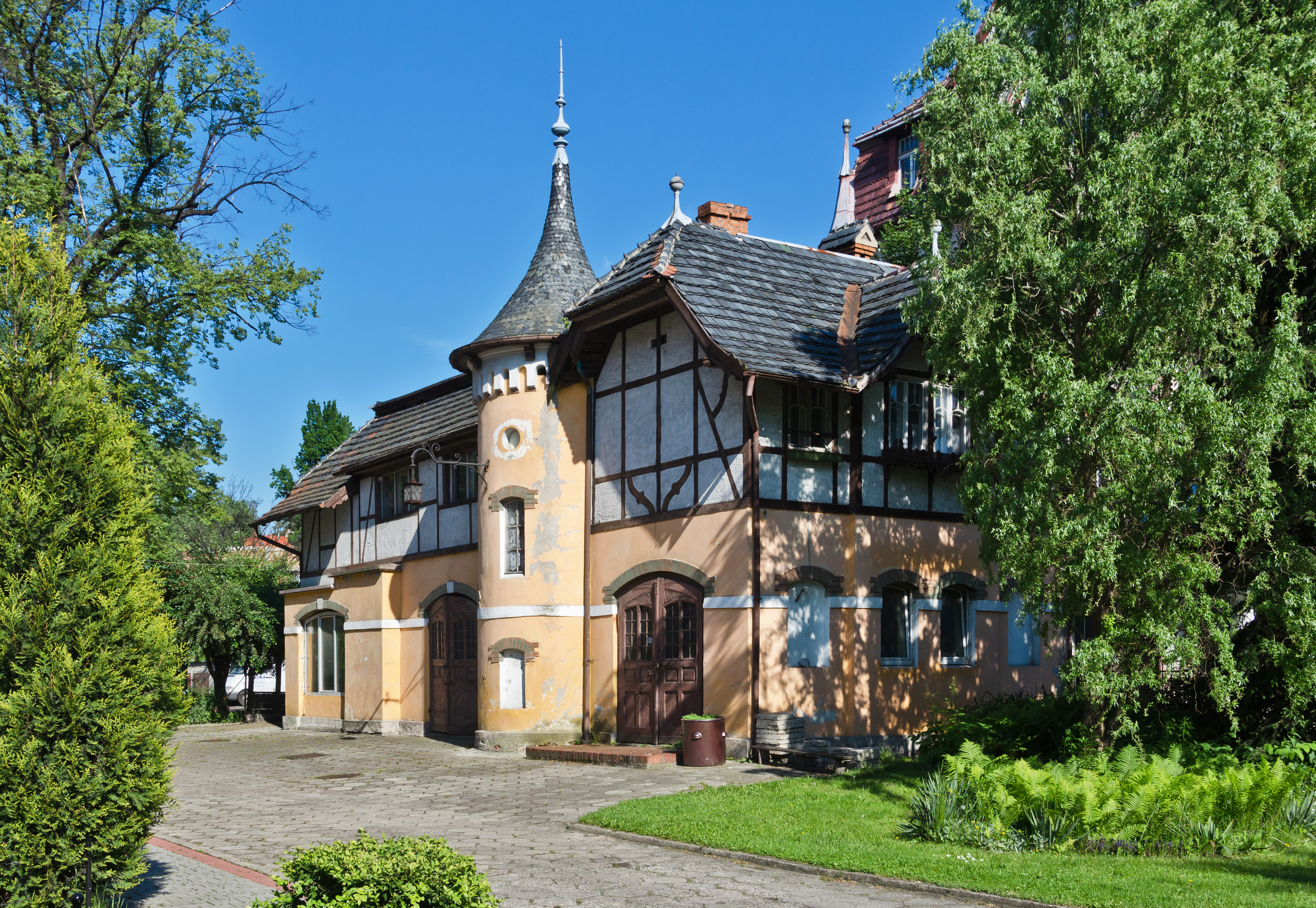 Dom szachulcowy, Kłodzko, ul. Łużycka